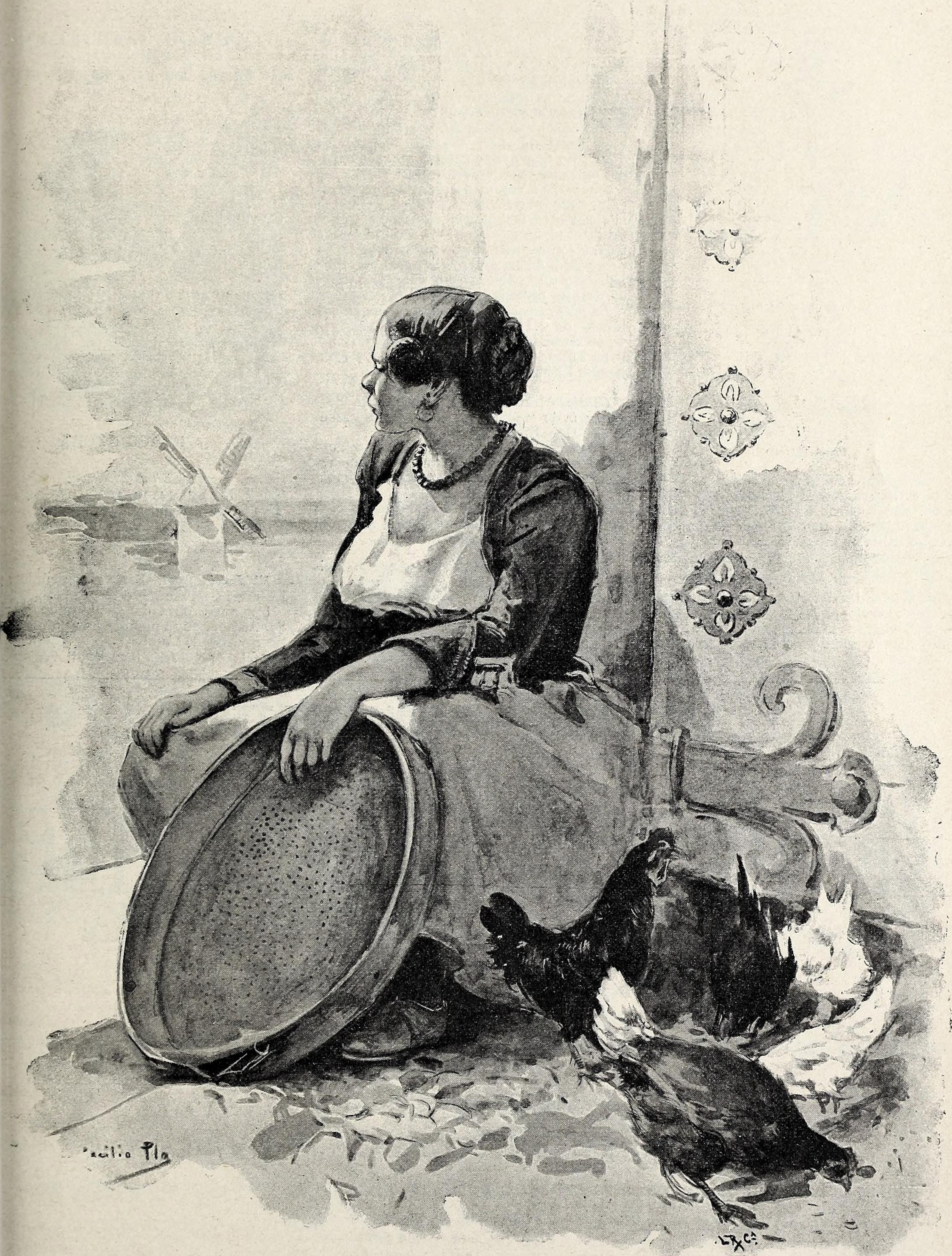 En la Mancha. Dulcinea del Toboso.